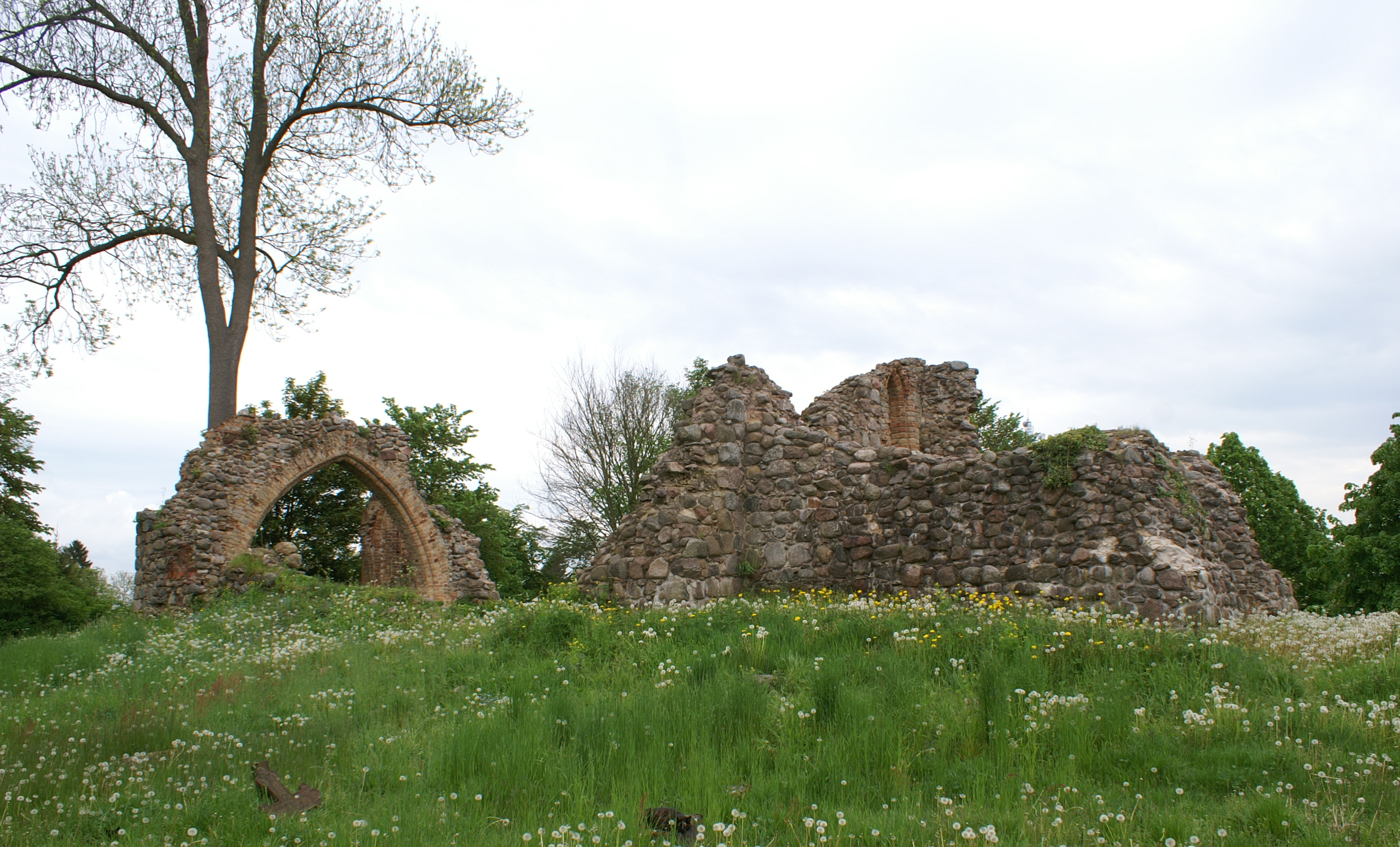 Karlsburg (Landkreis Ostvorpommern) - Ortsteil Steinfurth - Kirchenruine